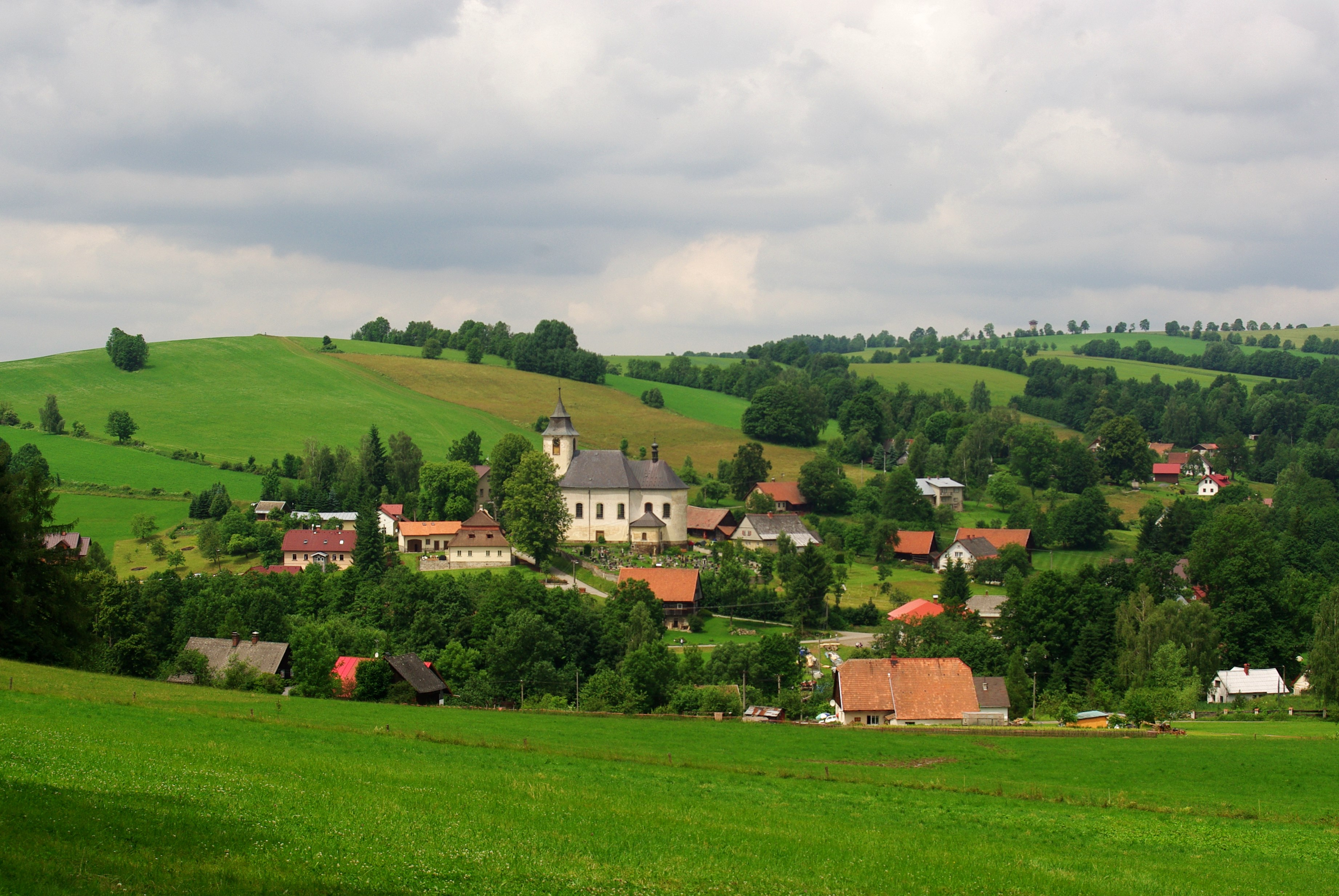 pohled na historické centrum